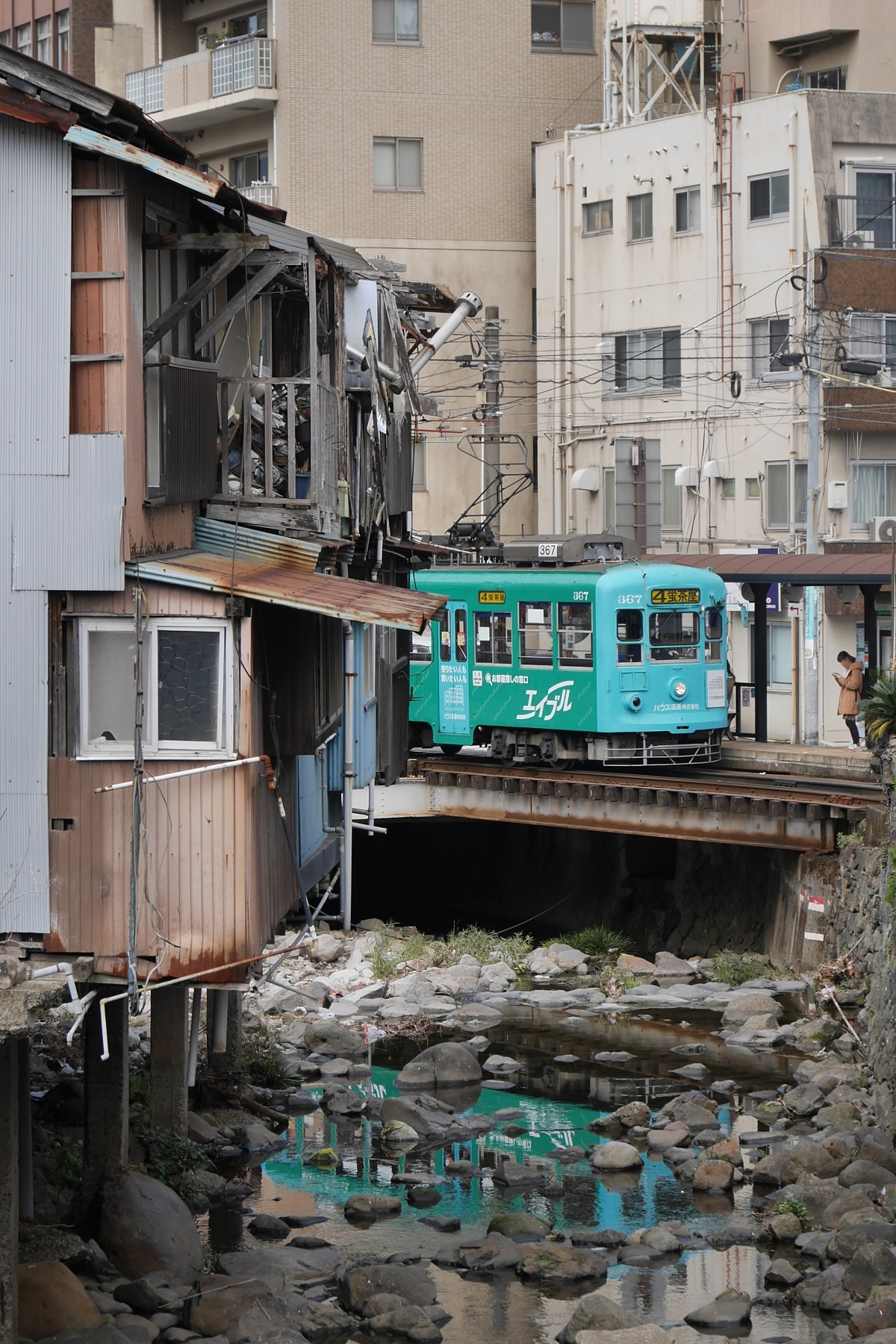 南側から見た長崎電気軌道の正覚寺下停留所（長崎県長崎市）。線路やホームの一部は川の上に設置されている。